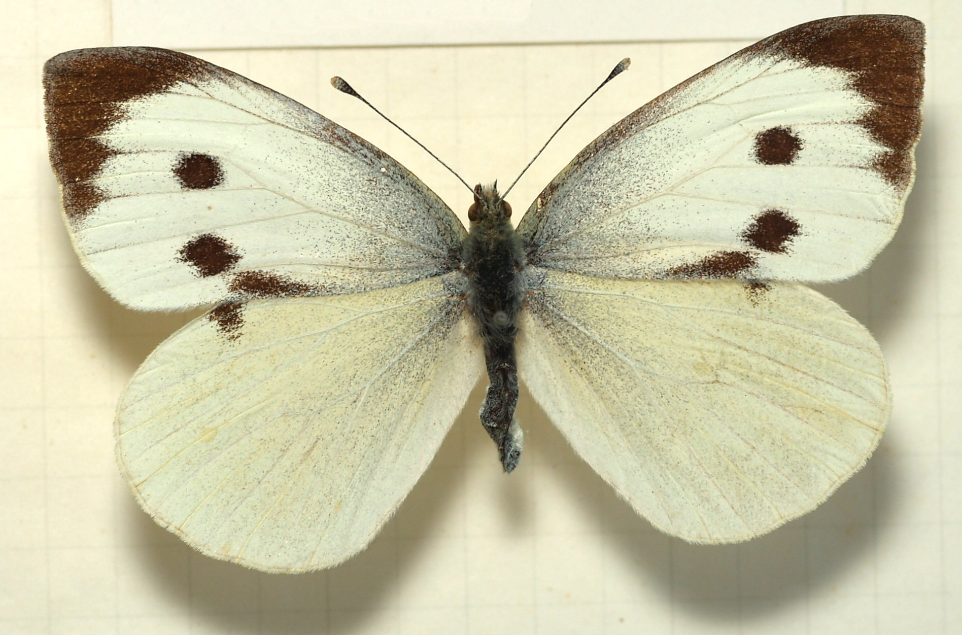 female Pieris brassicae